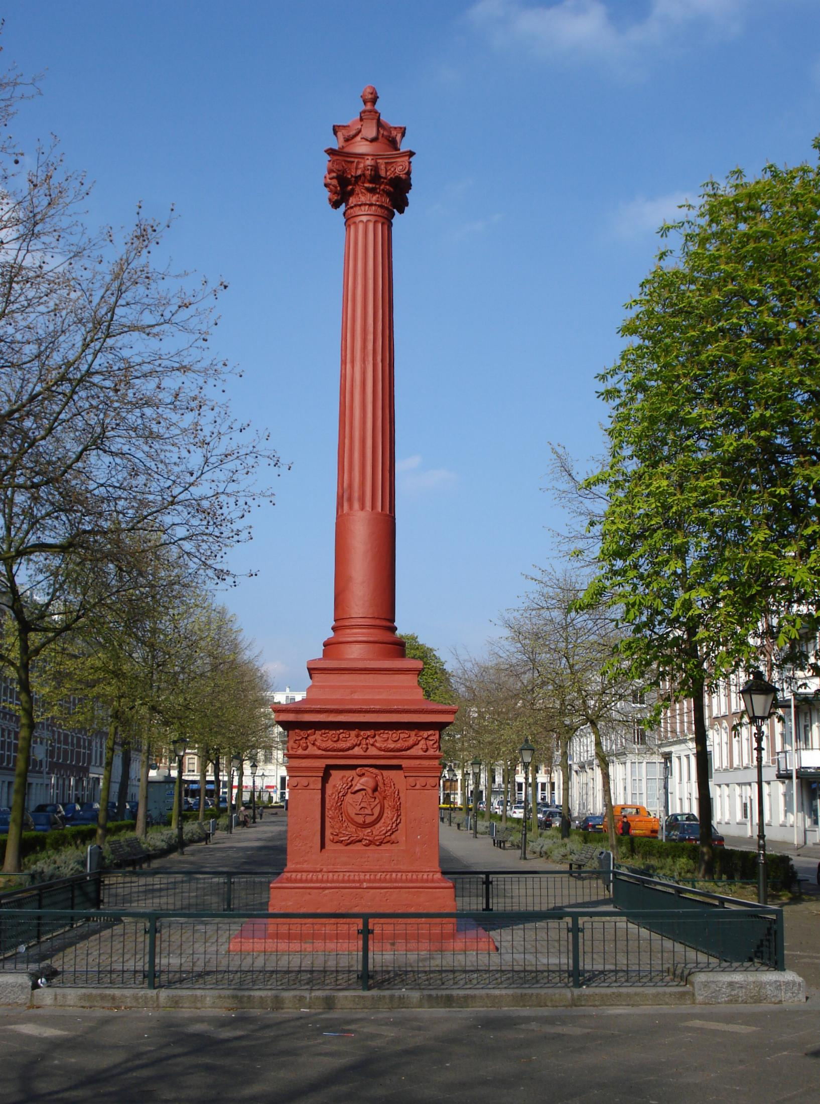 Rotterdam, Noordereiland. Stieltjesmonument. Rijksmonument.